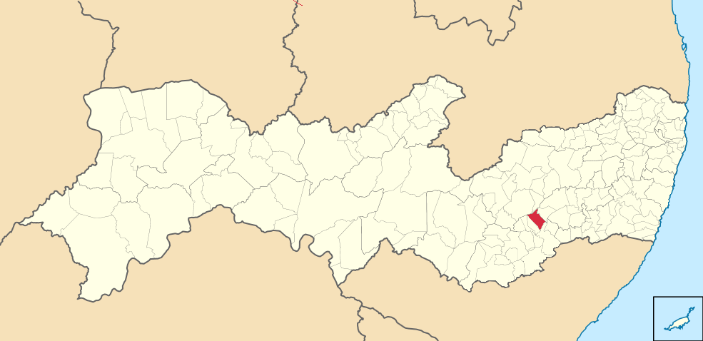 Mapa de Lajedo (2)